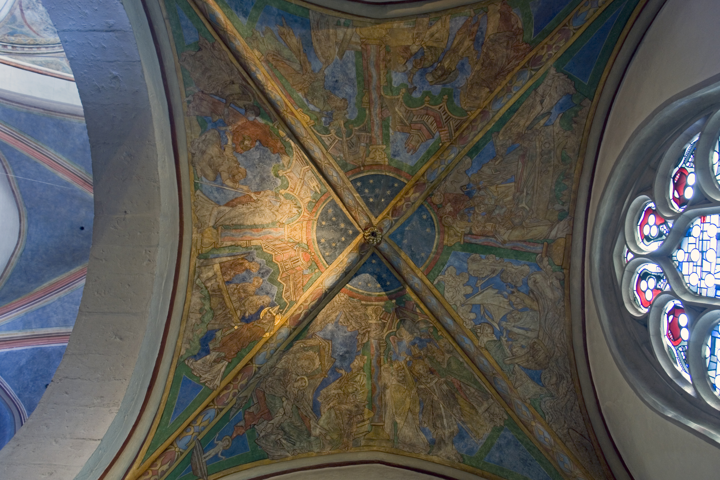 St. Maria in Lyskirchen, Gewölbefresken der nördlichen Seitenkapelle